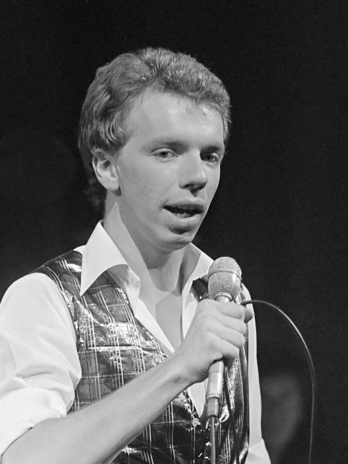 Jan Elbertse zingt nadat hij de Pisuisse-prijs ontvangen heeft 6 september 1977